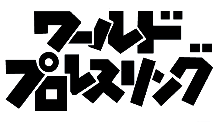 ワールドプロレスリング昭和期ロゴ